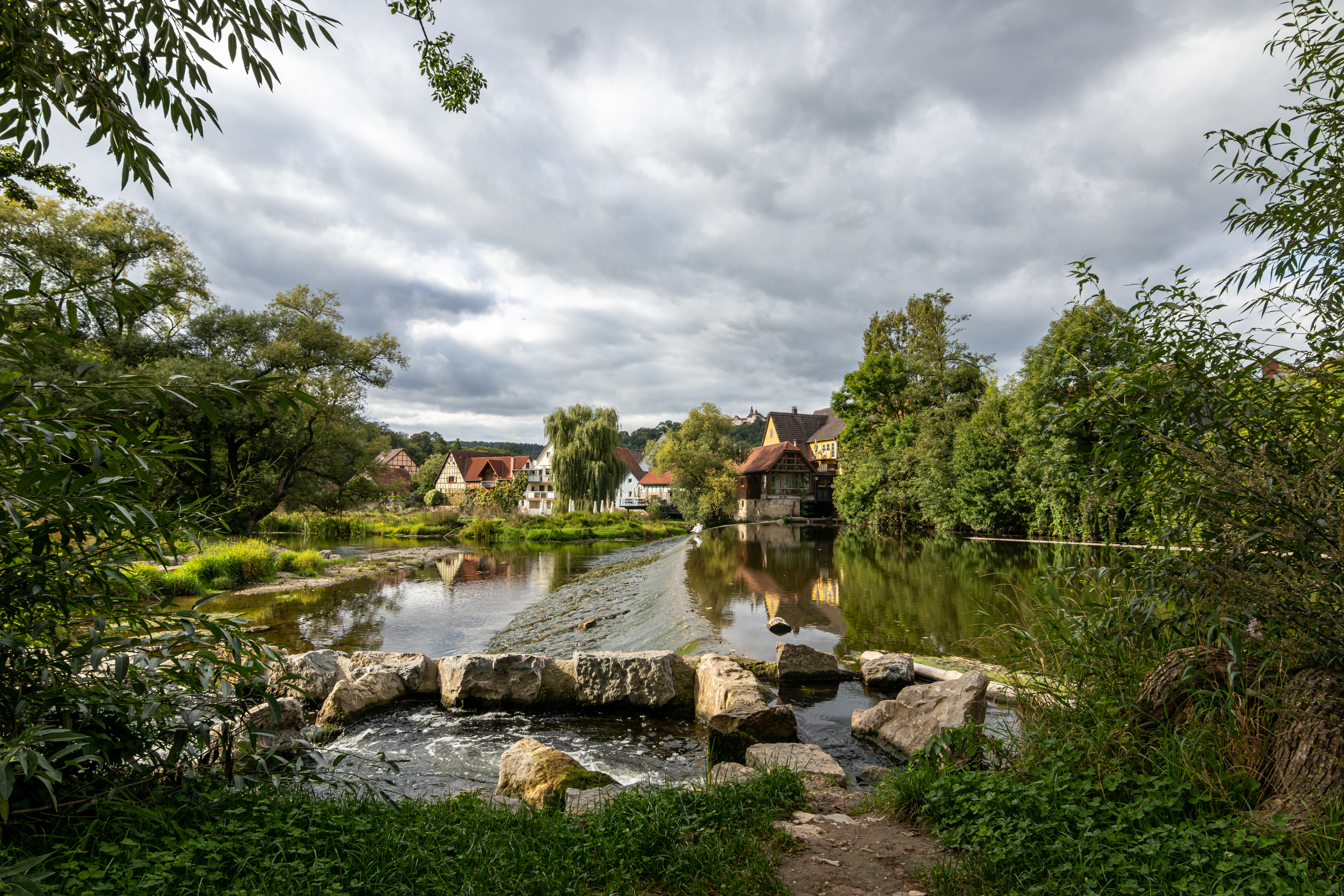 Blick über das Mühlenwehr der denkmalgeschützten Mosesmühle nach Bächlingen